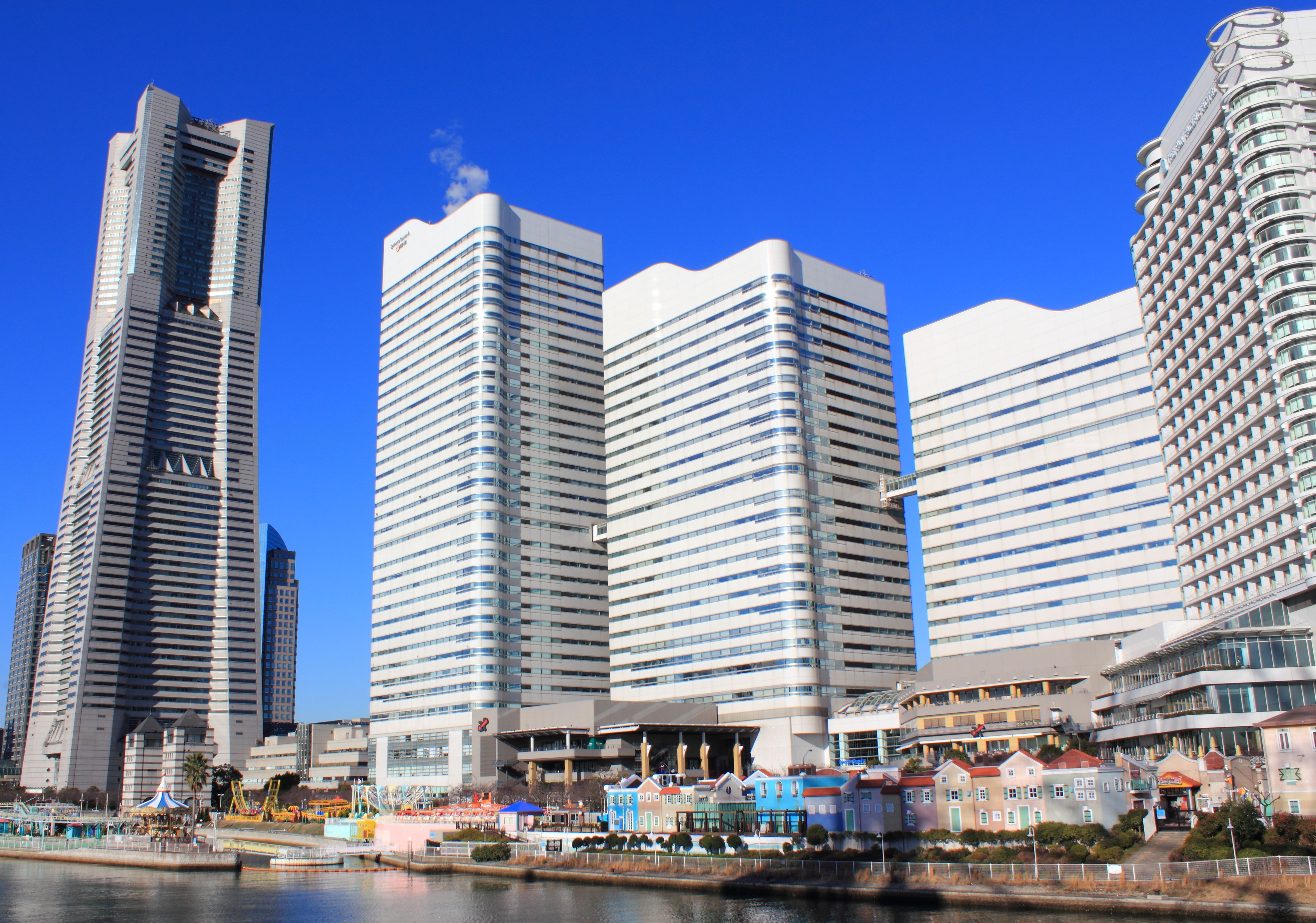 みなとみらい21（ランドマークタワー、クイーンズスクエア横浜）